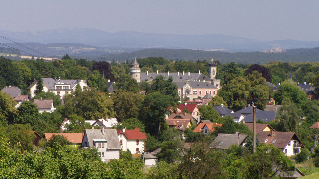 Radimovice se zámkem Sychrov, v pozadí Suché skály a na horizontu vrcholky Krkonoš